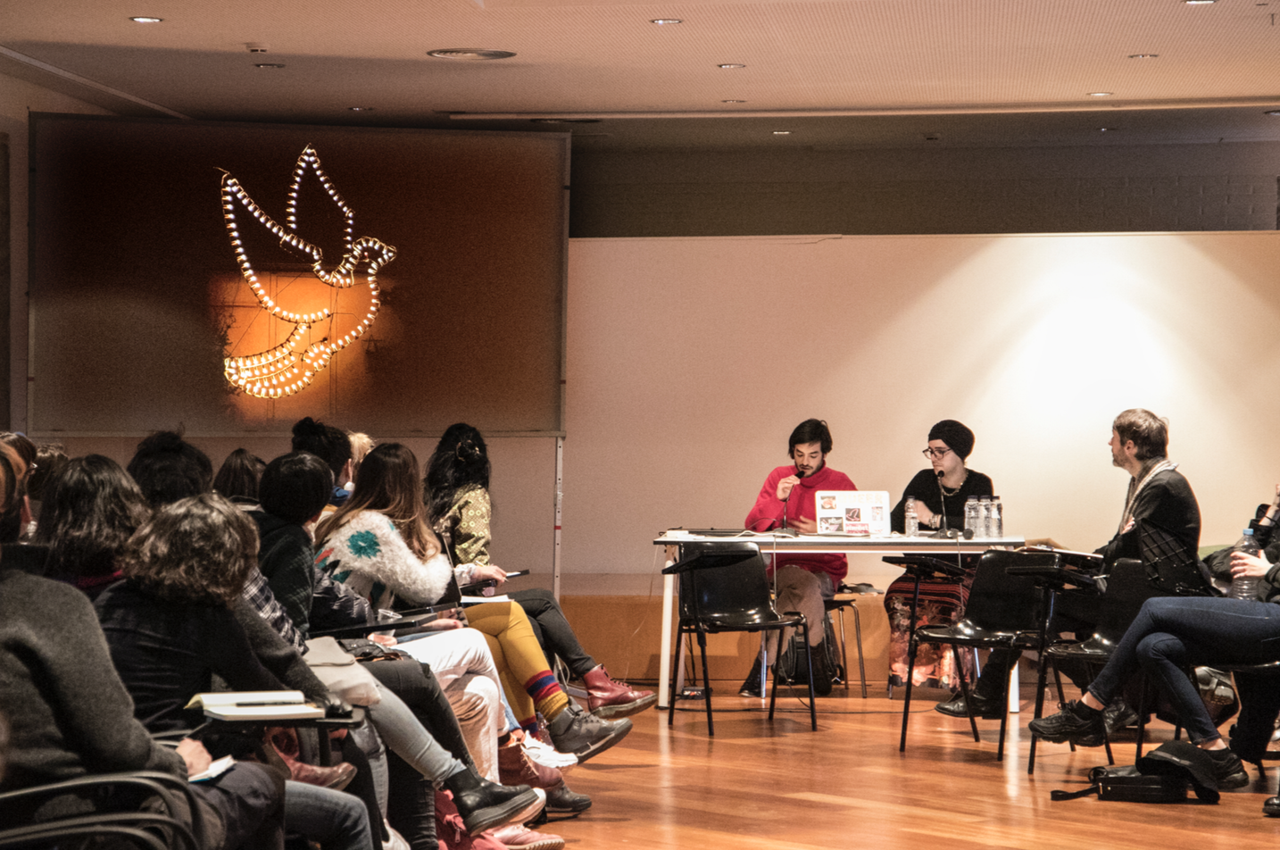 Equipo palomar en una conferencia en MACBA